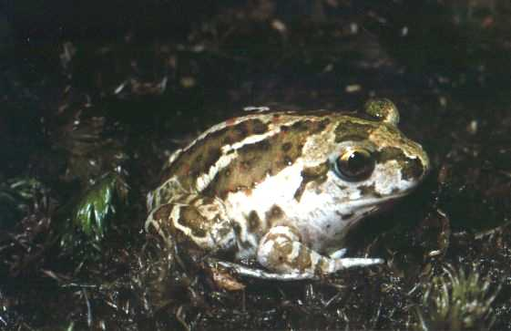 Pelobates fuscus fuscus